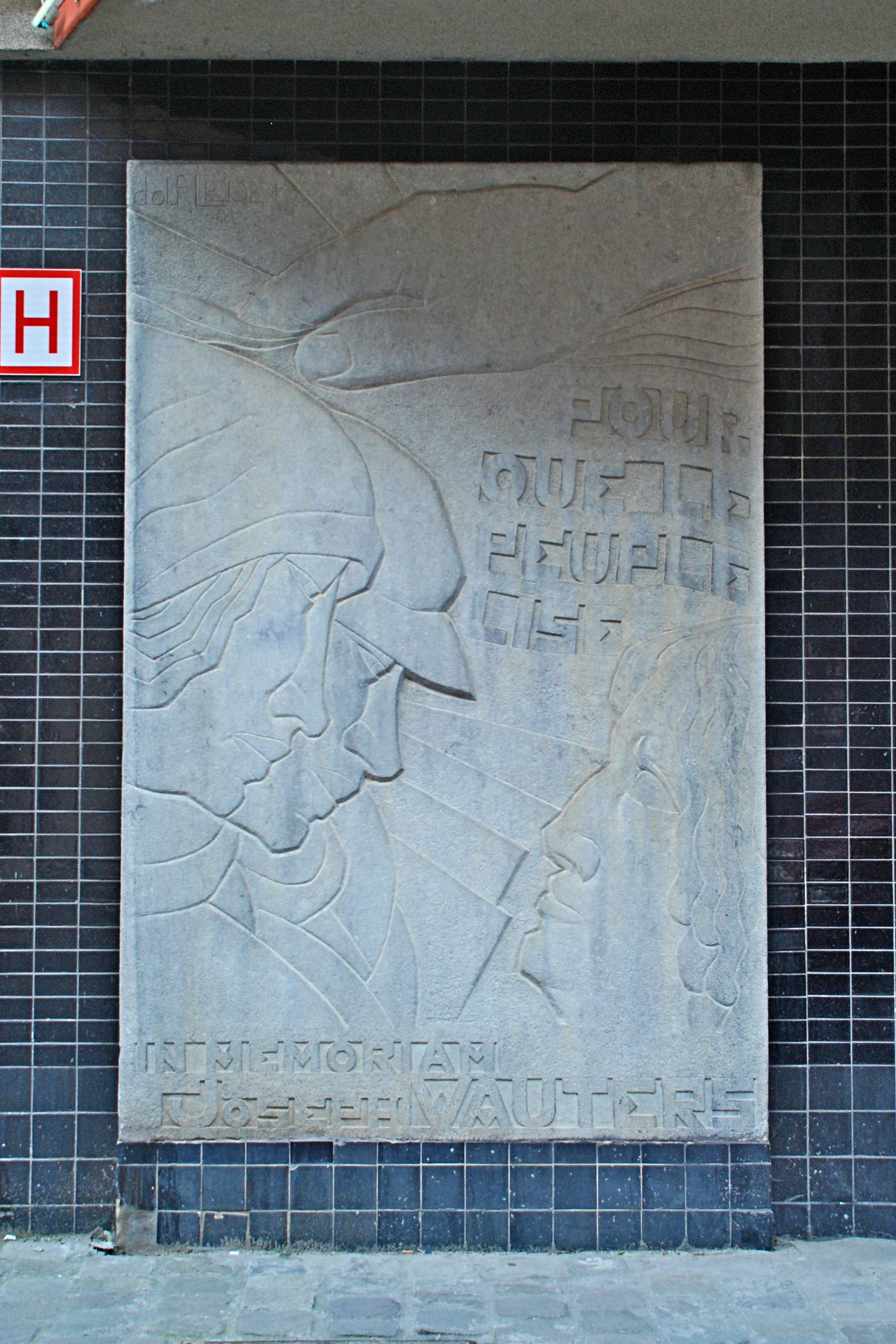 Belgique - Bruxelles - Ancienne imprimerie du quotidien Le Peuple (Architecture moderniste, architectes Fernand et Maxime Brunfaut, 1931)